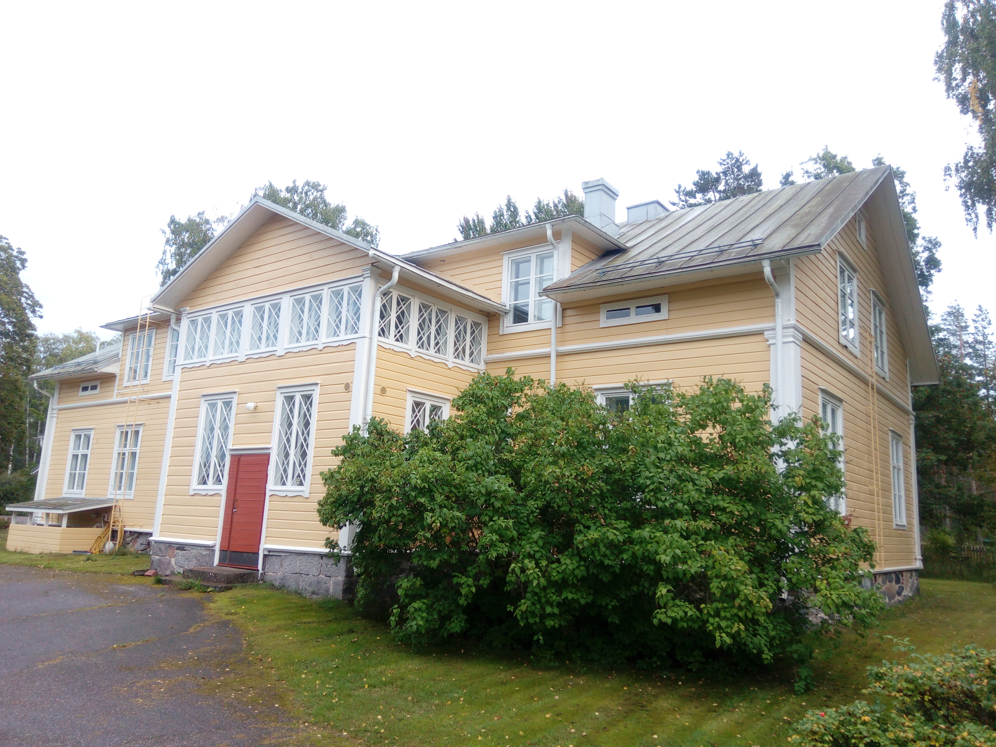 Santalan kartanon päärakennus Santalassa Hangossa